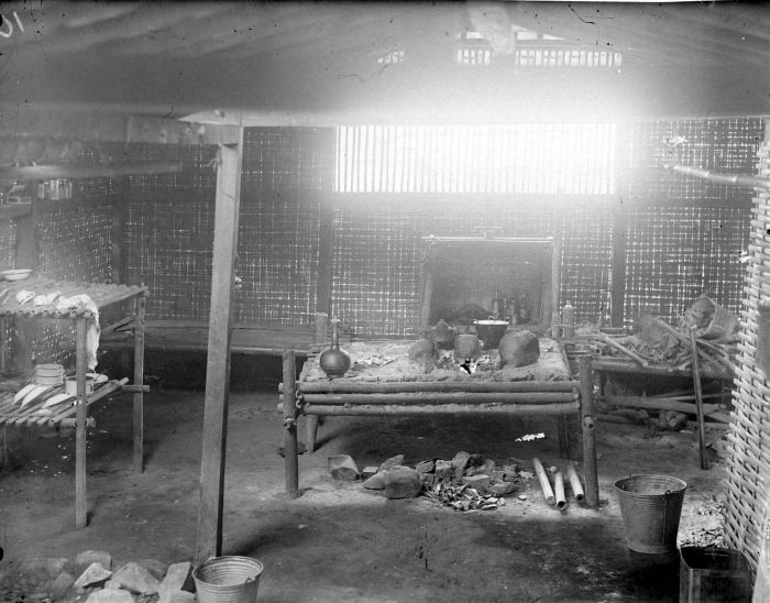 Negatief. Kampongkeuken, Preanger